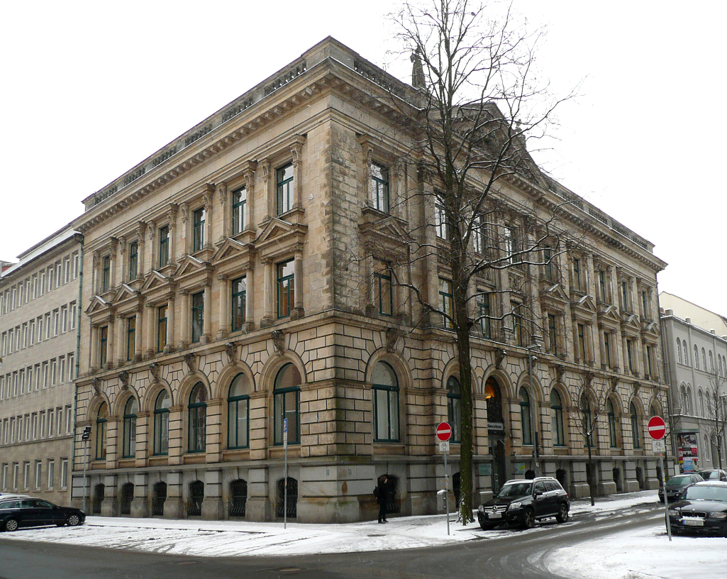 Landschaftsstrasse 8 in Hannover